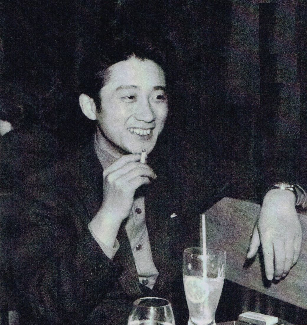 新潮社『週刊新潮』第15巻第6号（1961）より三浦哲郎